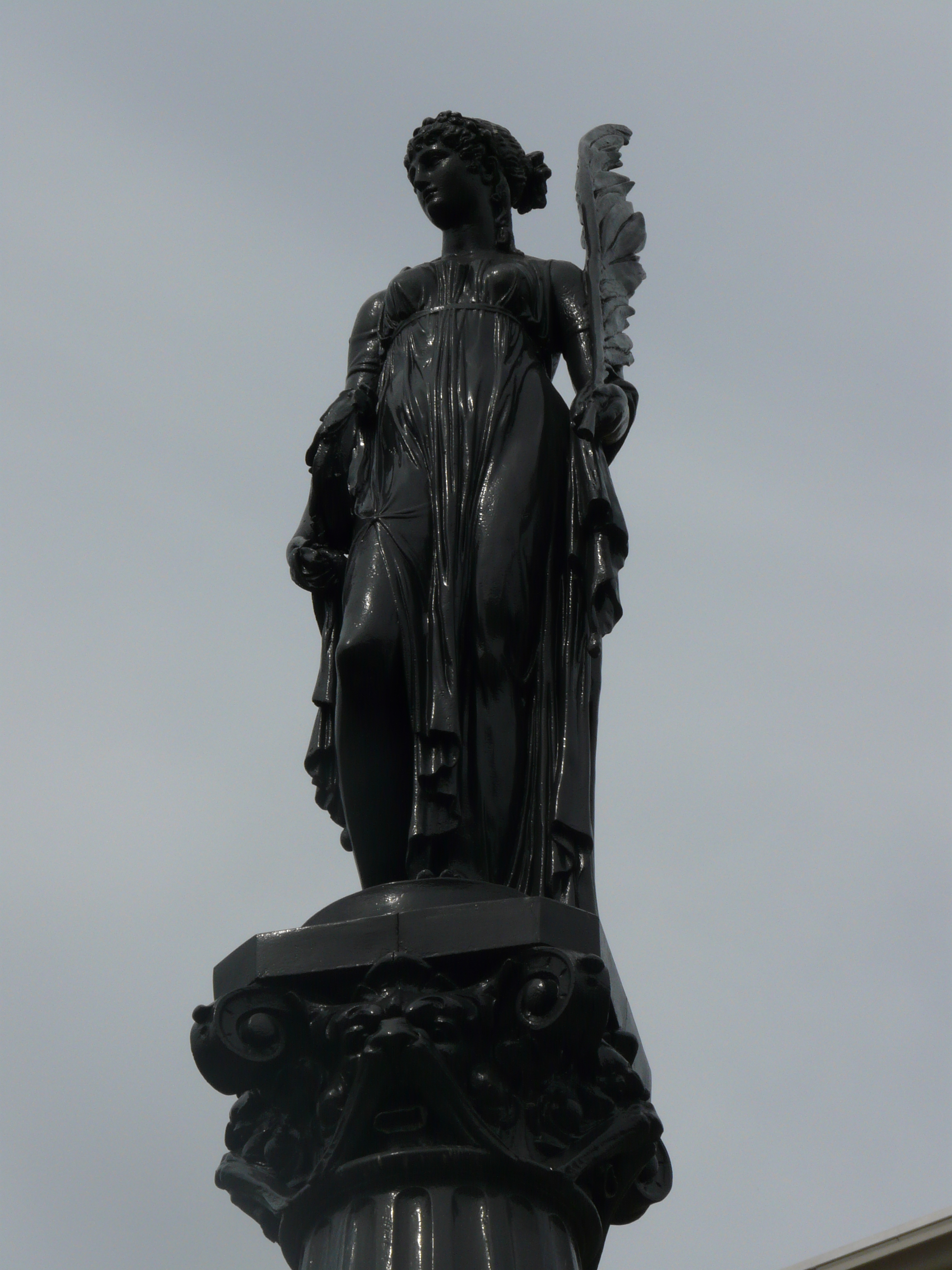 Detail Wilhelminafontein op de Grote Markt in het centrum van Gorinchem